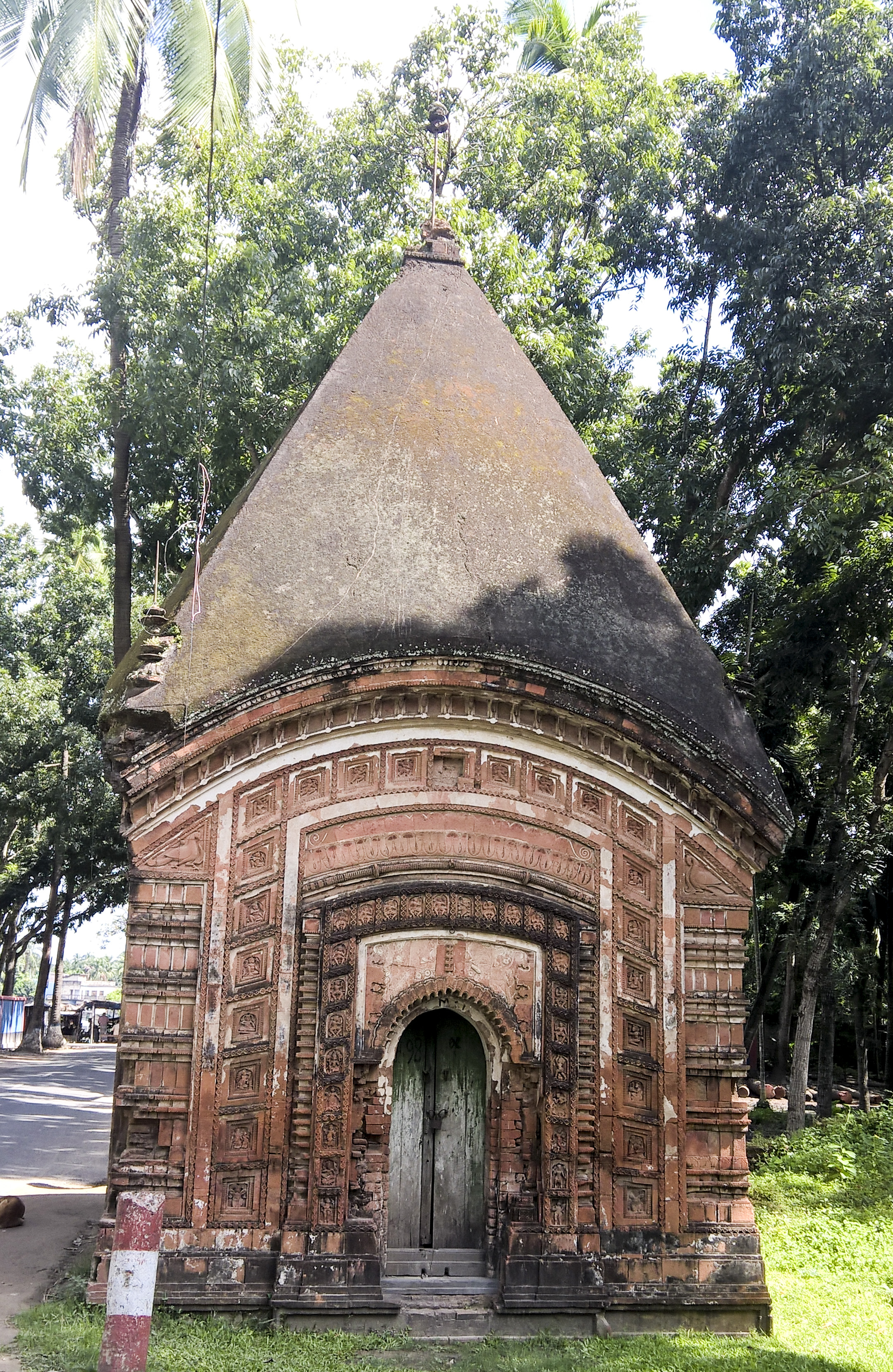 ছোট শিব মন্দির রাজশাহীর, পুঠিয়া উপজেলার অন্তর্গত একটি প্রাচীন মন্দির এবং এটি বাংলাদেশ প্রত্নতত্ত্ব অধিদপ্তর এর তালিকাভুক্ত প্রত্নতাত্ত্বিক স্থাপনাগুলোর একটি।